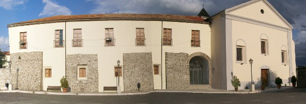 Convento e Chiesa SS. Annunziata Ceppaloni (BN) - sec. XVI